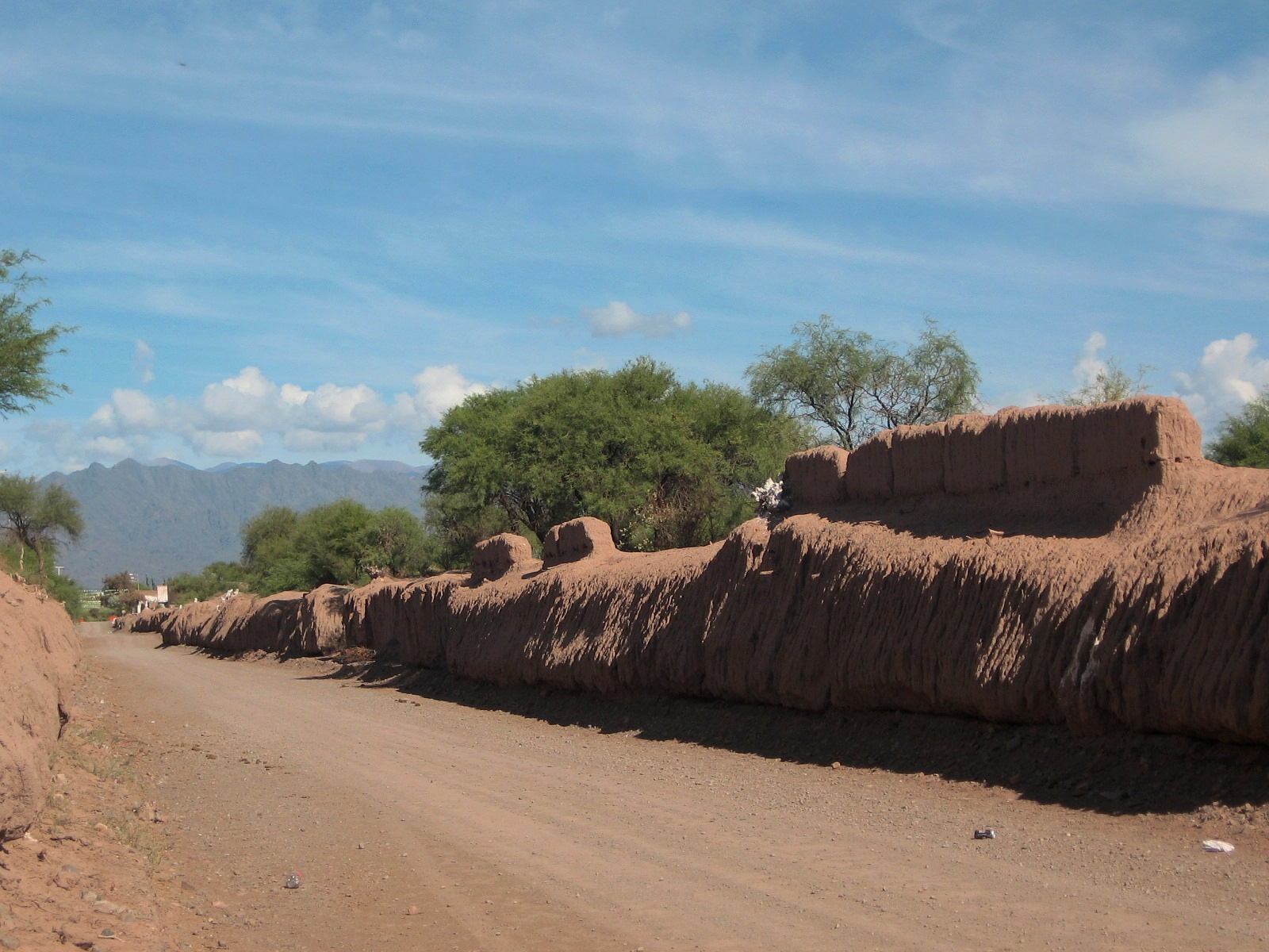 Callejón típico en la localidad de Jagüe, Provincia de La Rioja